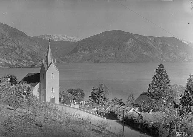 Leikanger kirke, Leikanger, 28. mai 1941